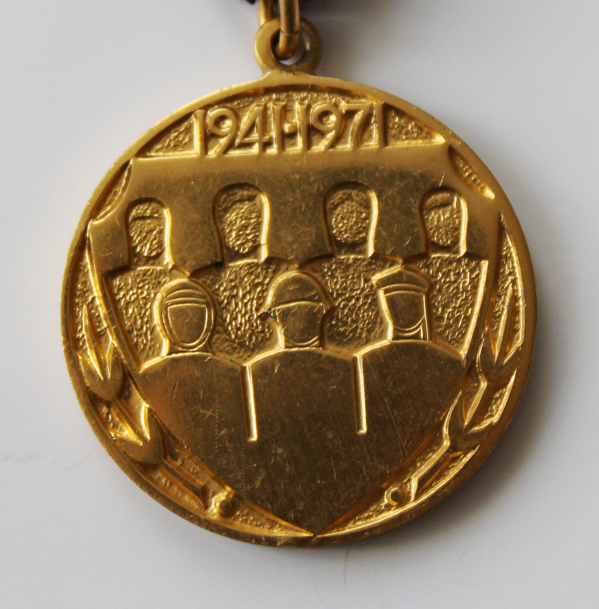 Спомен-медаља поводом тридесетогодишњице ЈНА, 1971. година (предња страна)